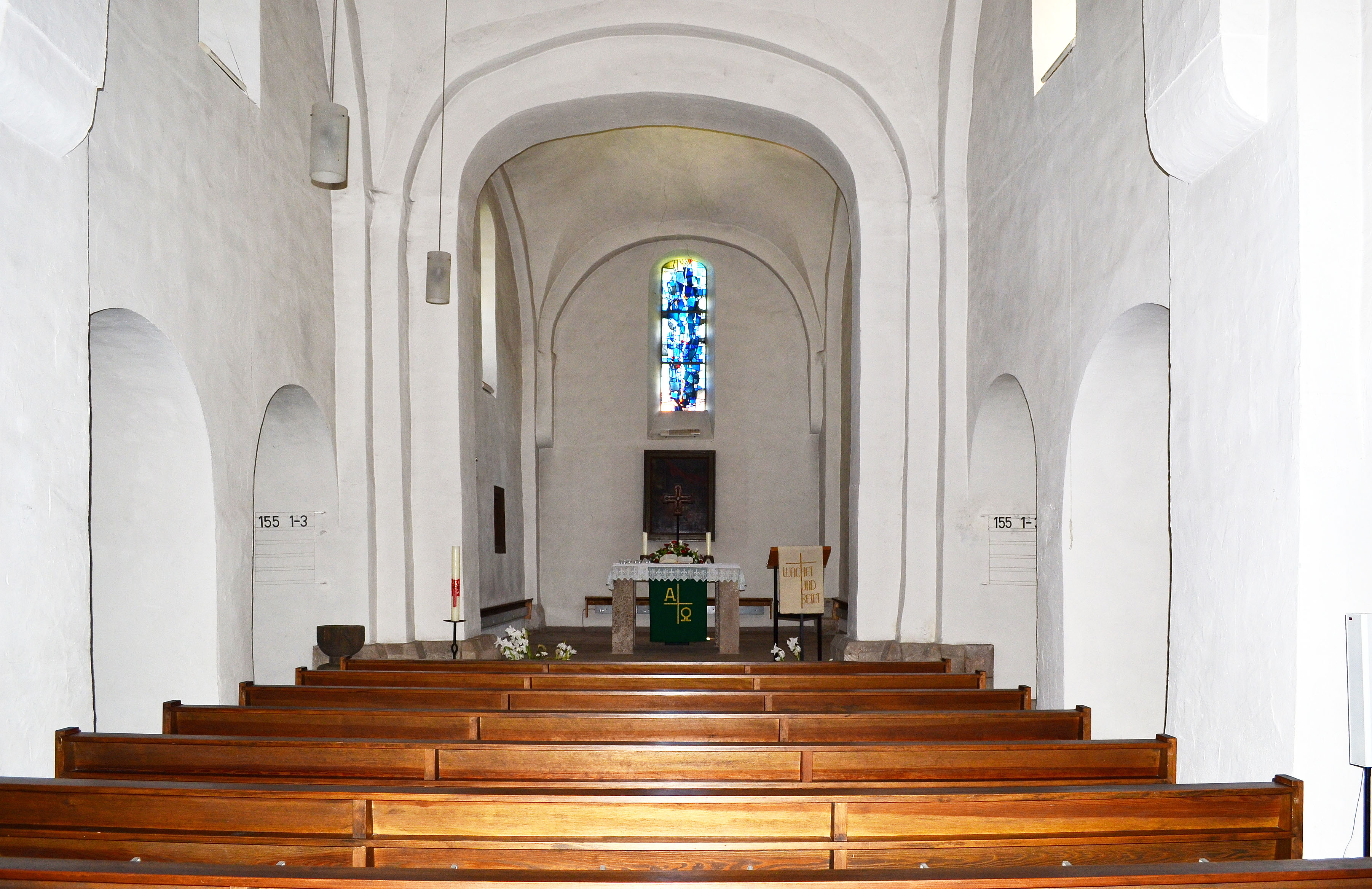 Heringhausen, Diemelsee, Kirche St. Barbara, Blick durch das Kirchenschiff auf den Altar 8